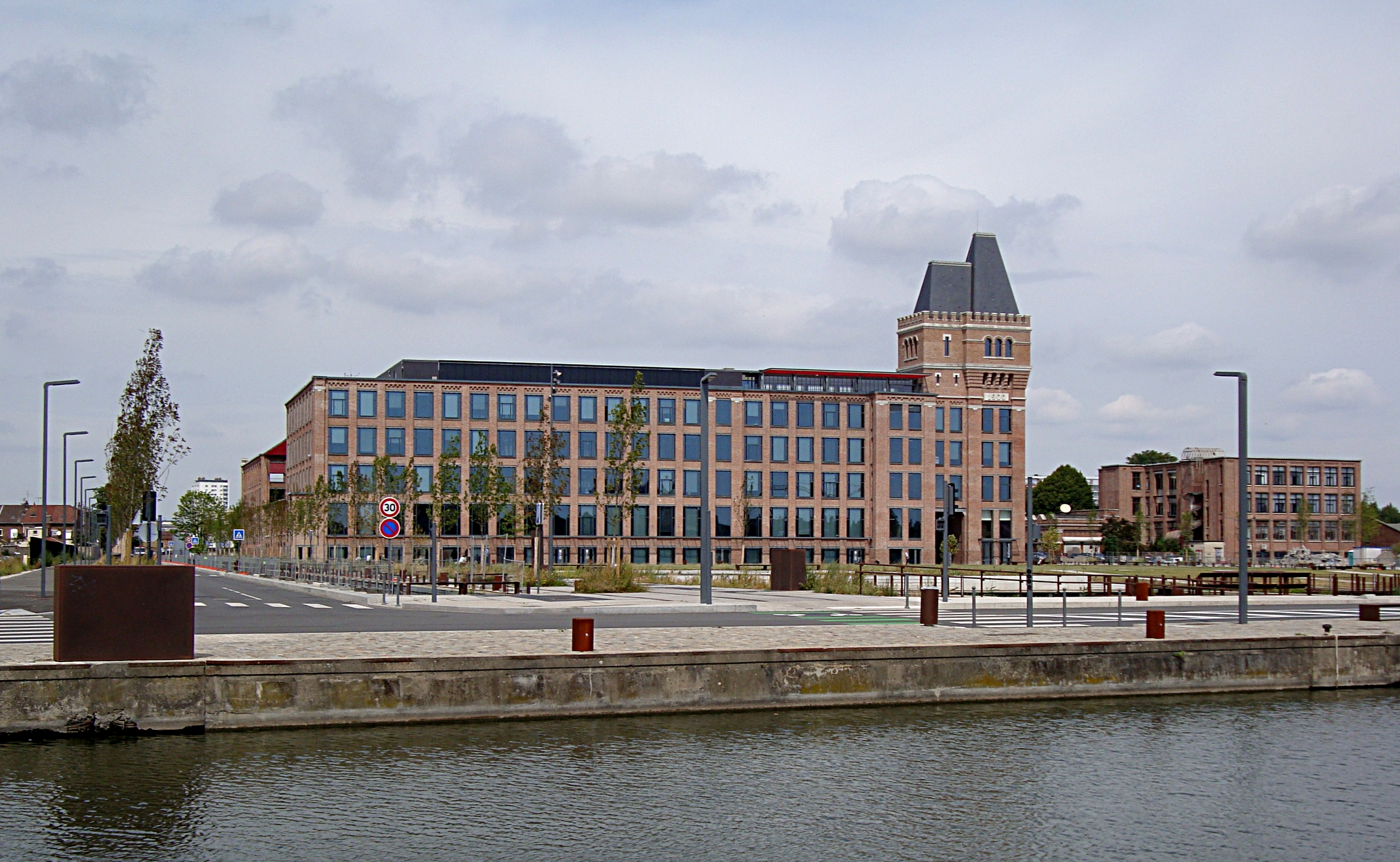 Le site Euratechnologies à Lille Lomme (Nord).